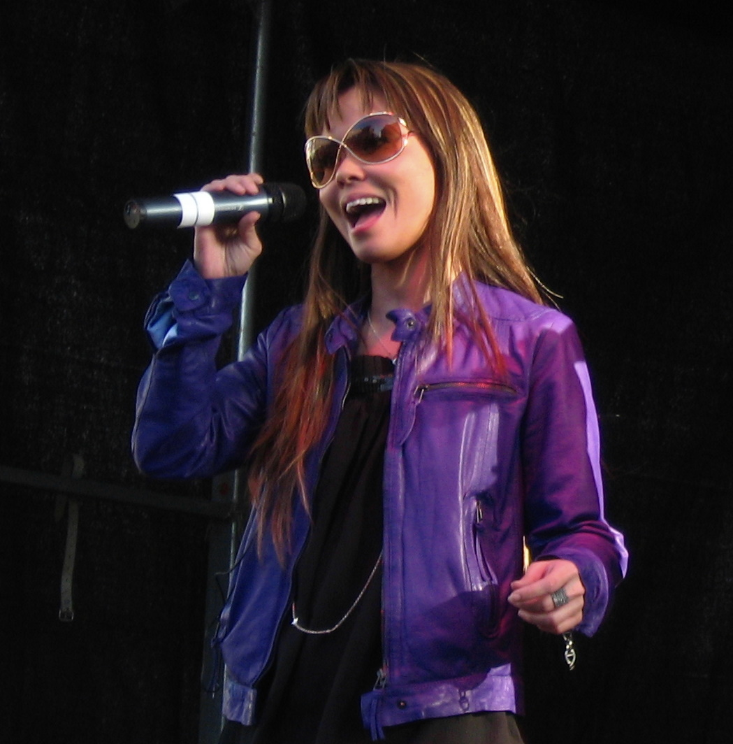 Christina Chanée i Hjørring